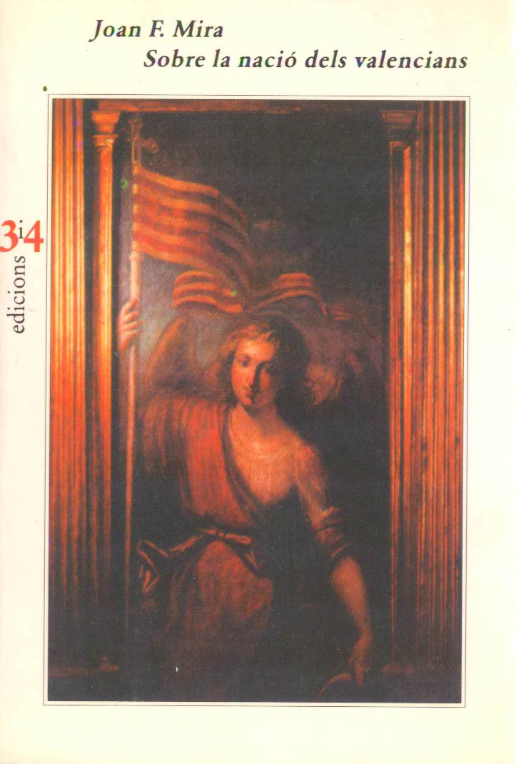 Portada del llibre "Sobre la nació dels valencians".